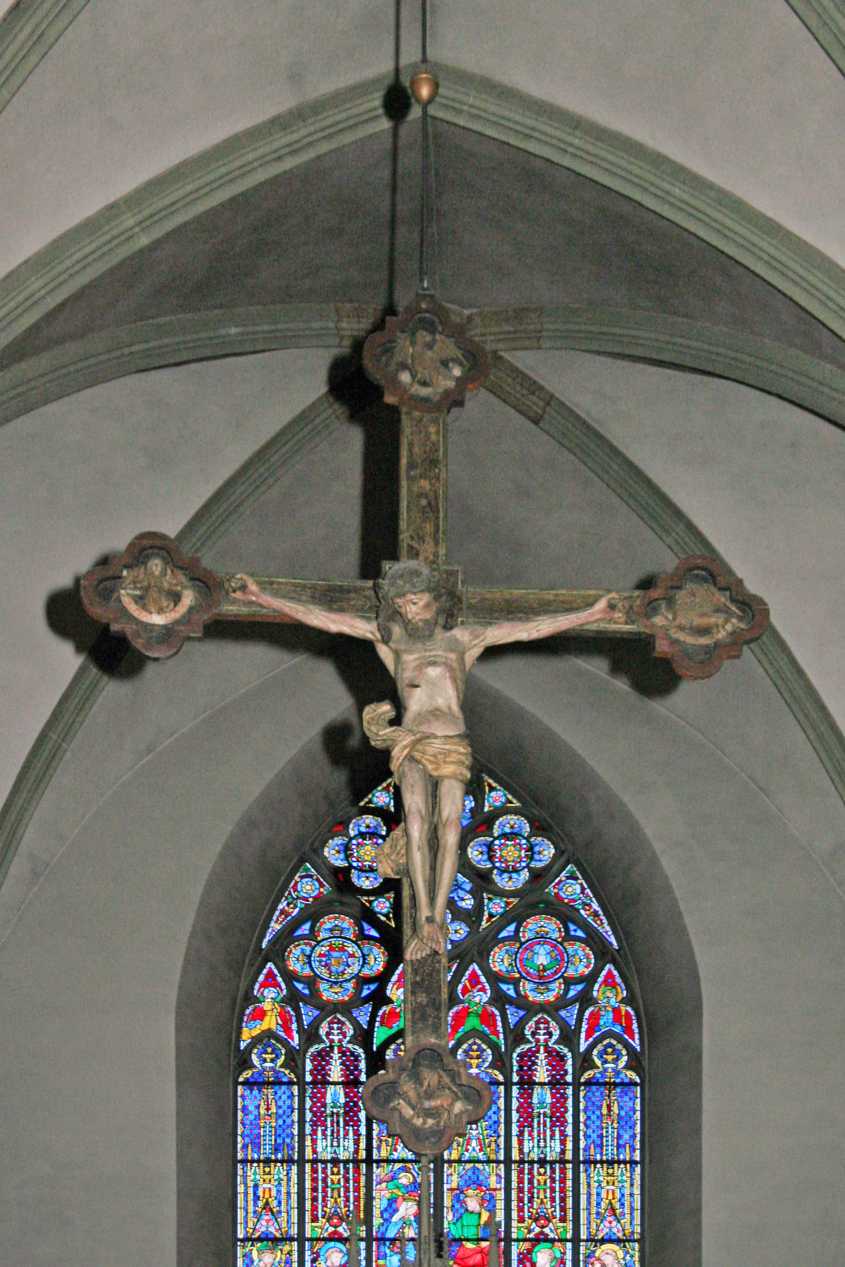 Triumpfkreuz im Eingangsbogen zum Chor der Propsteikirche Brilon